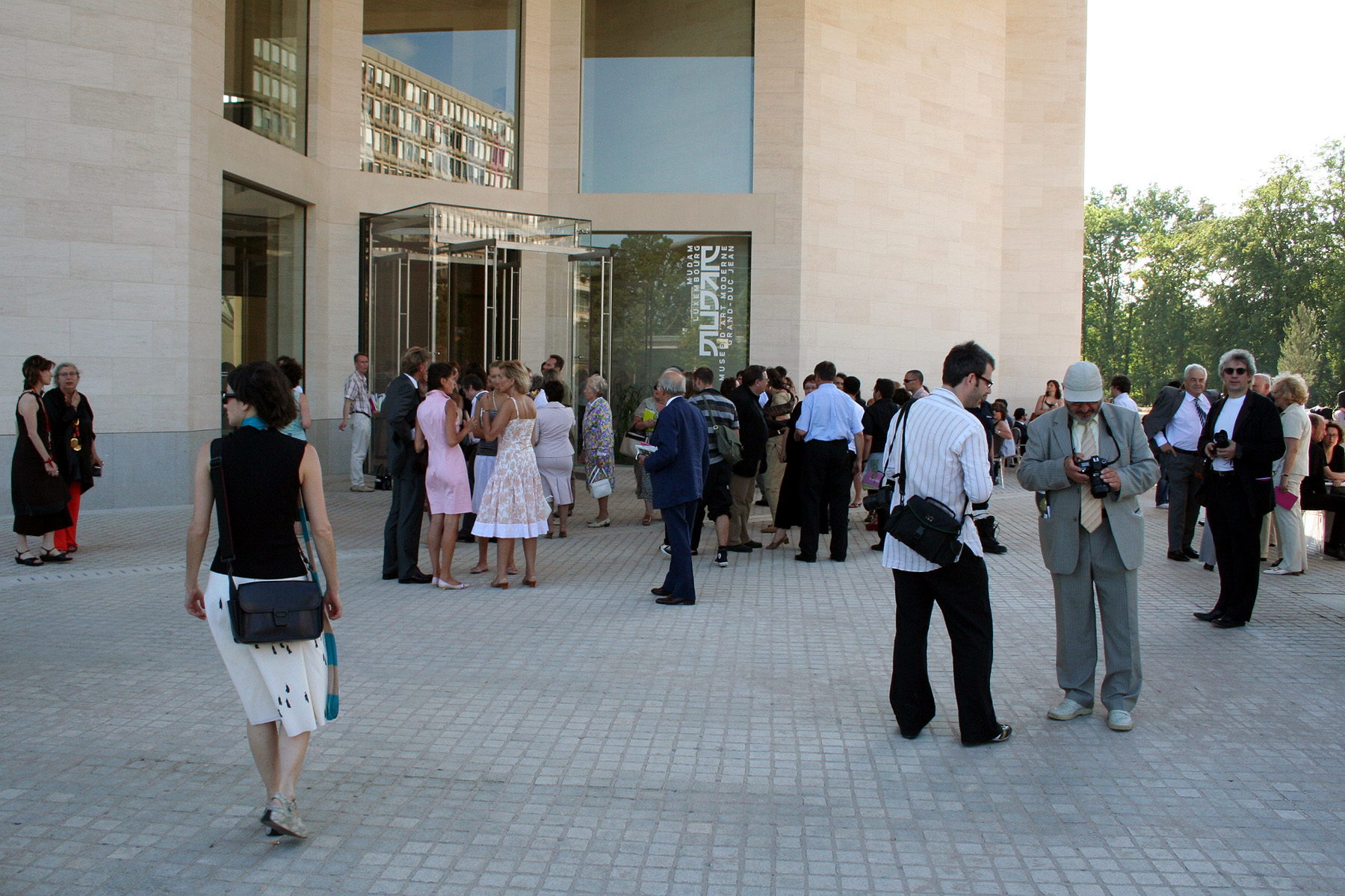 MUDAM (Musée d'Art Moderne Grand-Duc Jean), Luxembourg